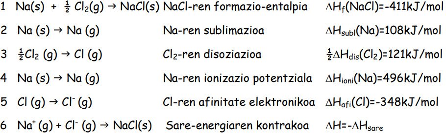 Born Haber-en zikloaren adibidea NaCl oinarritzat hartuta